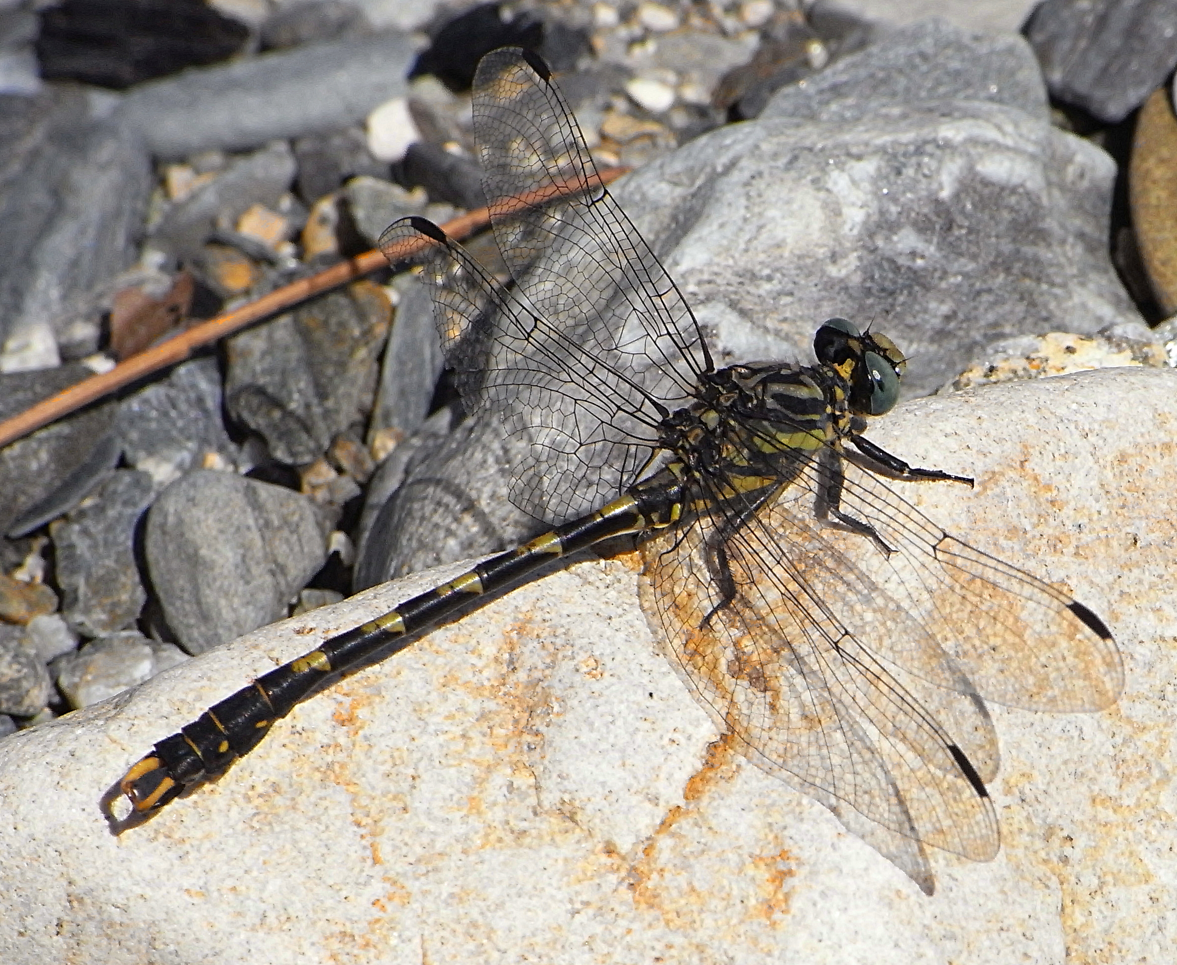 Onychogomphus uncatus male Ricoh R8